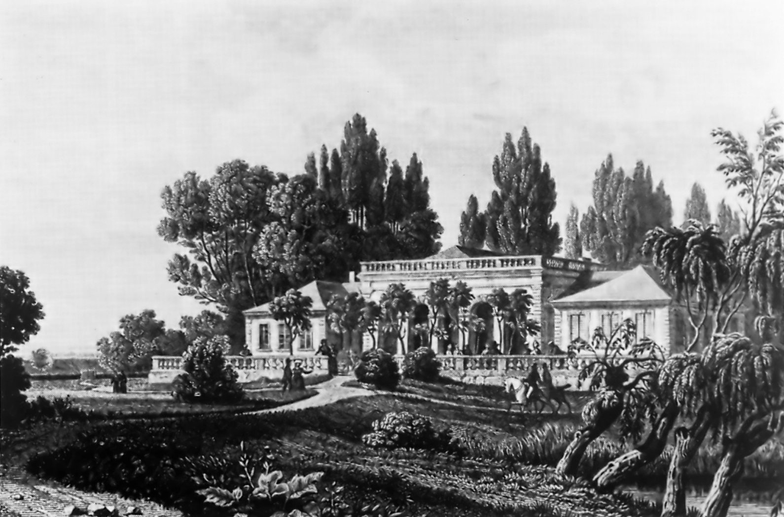 Mühlauer Schlösschen in Mannheim